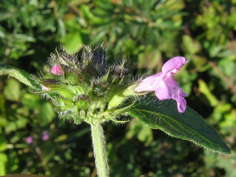 Wirbeldost (Clinopodium vulgare)